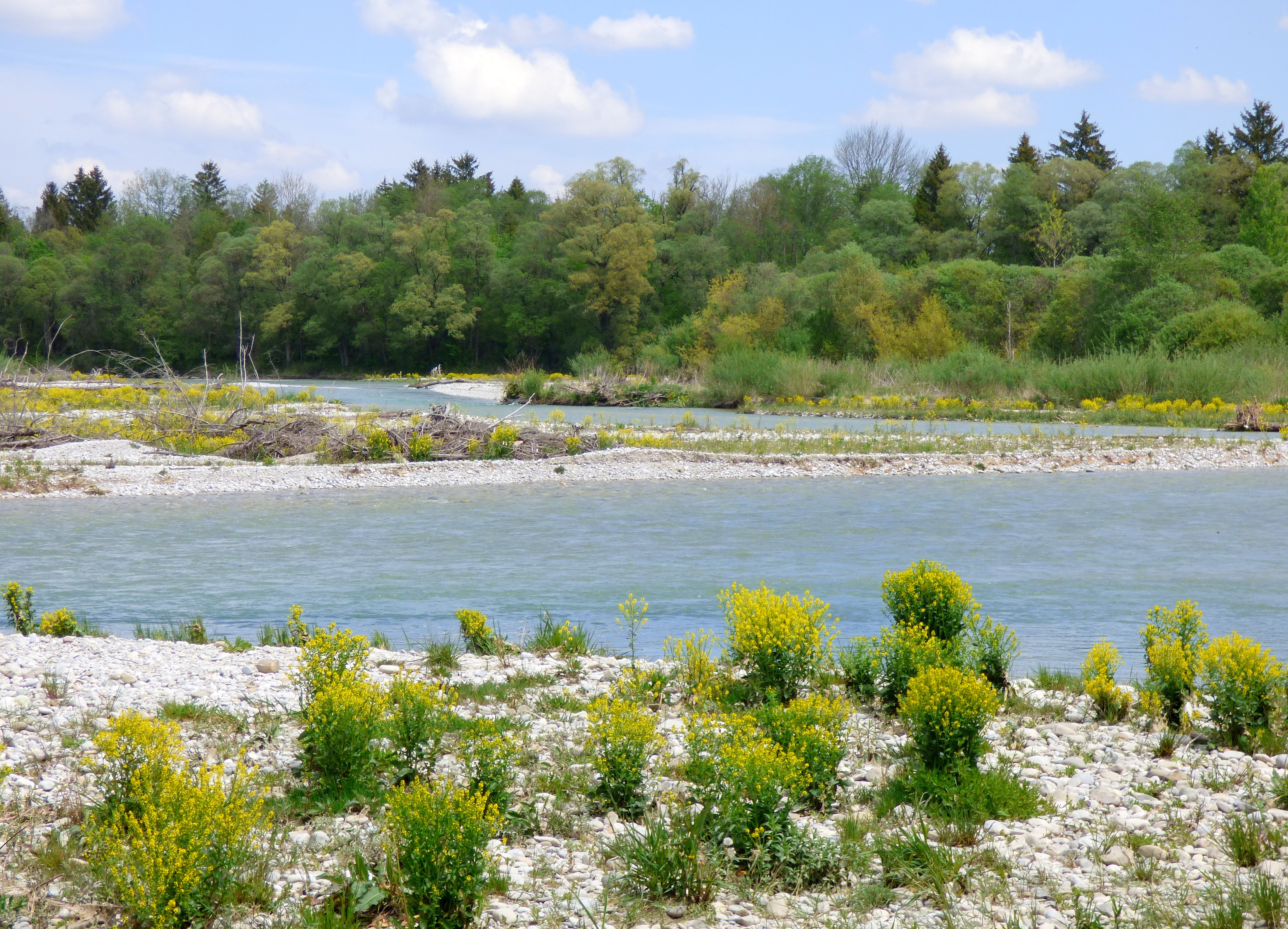 Wilde, naturbelassene Isar mit Kiesbänken und Kiesinseln im Natur- und Landschaftsschutzgebiet Pupplinger Au im Landkreis Bad Tölz - Wolfratshausen